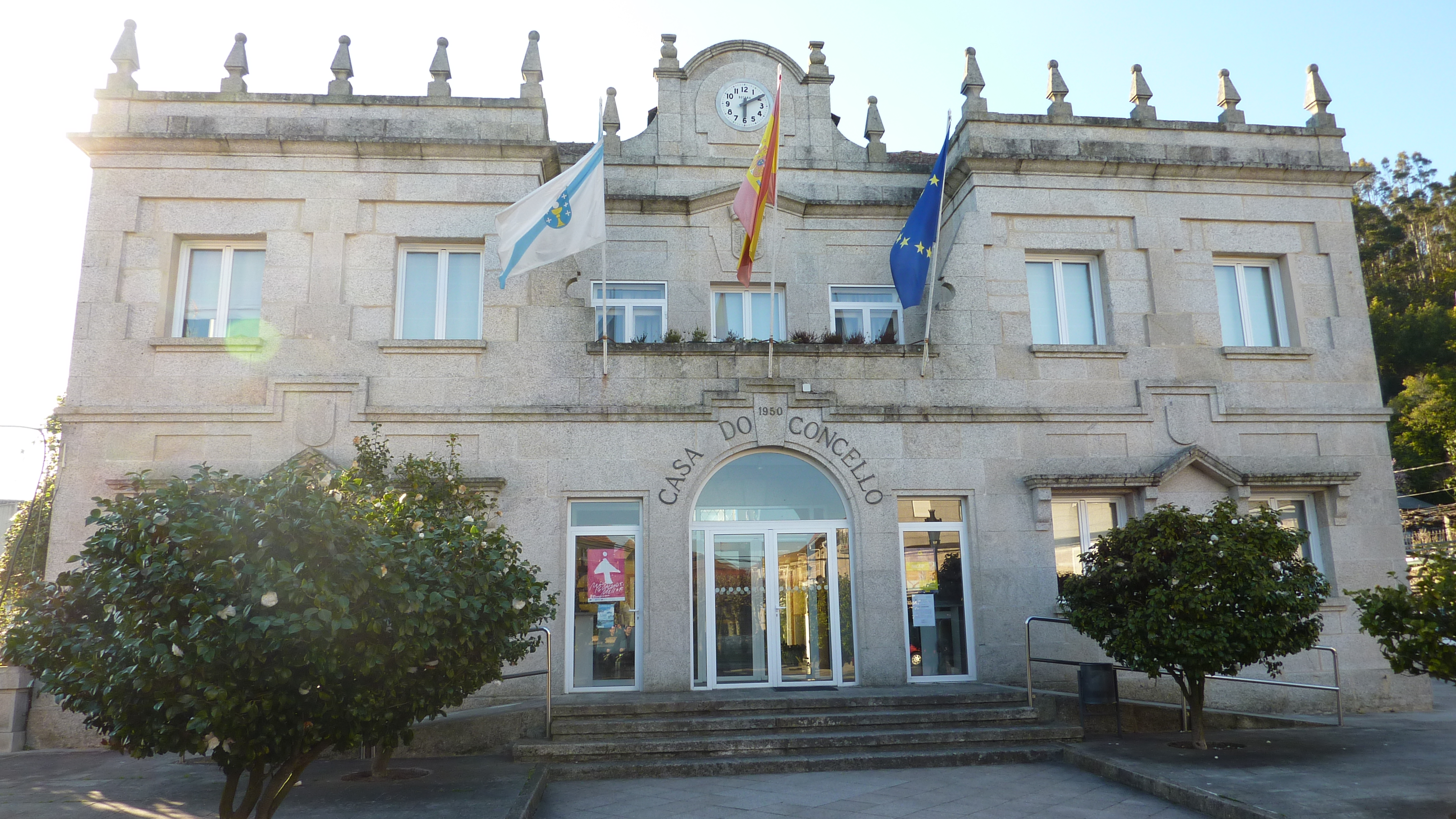 Casa do concello das Neves (Pontevedra)